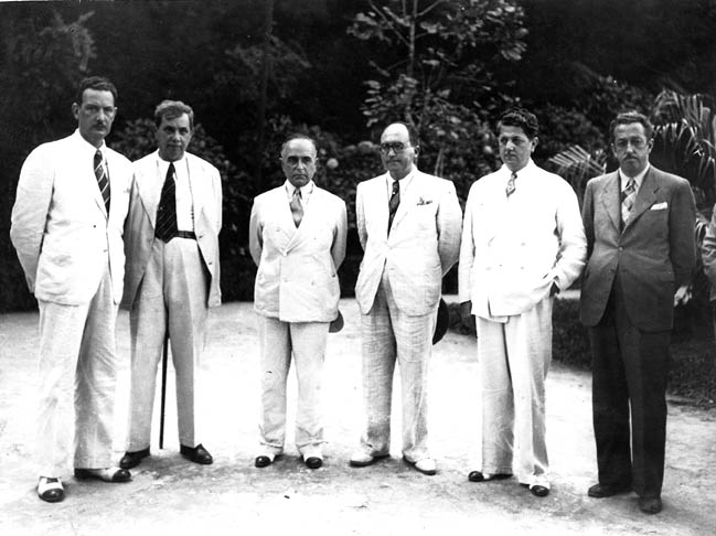 Filinto Müller, Góis Monteiro, Getúlio Vargas, Valdemar Falcão, Benedito Valadares e Israel Pinheiro (esquerda para direita), 1938. São Lourenço(MG) - Brasil